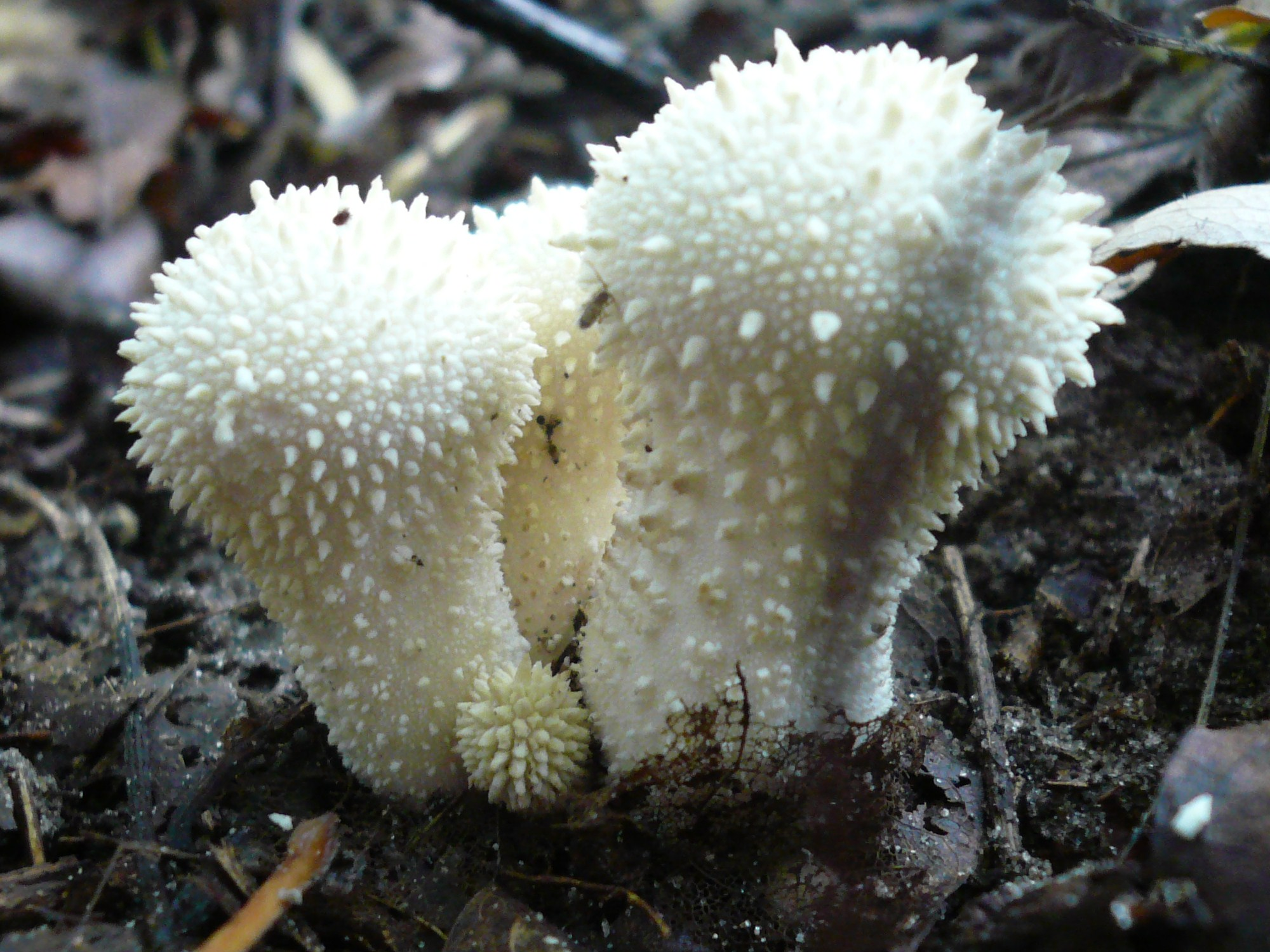 Purchawki chropowate w Lesie Bemowskim